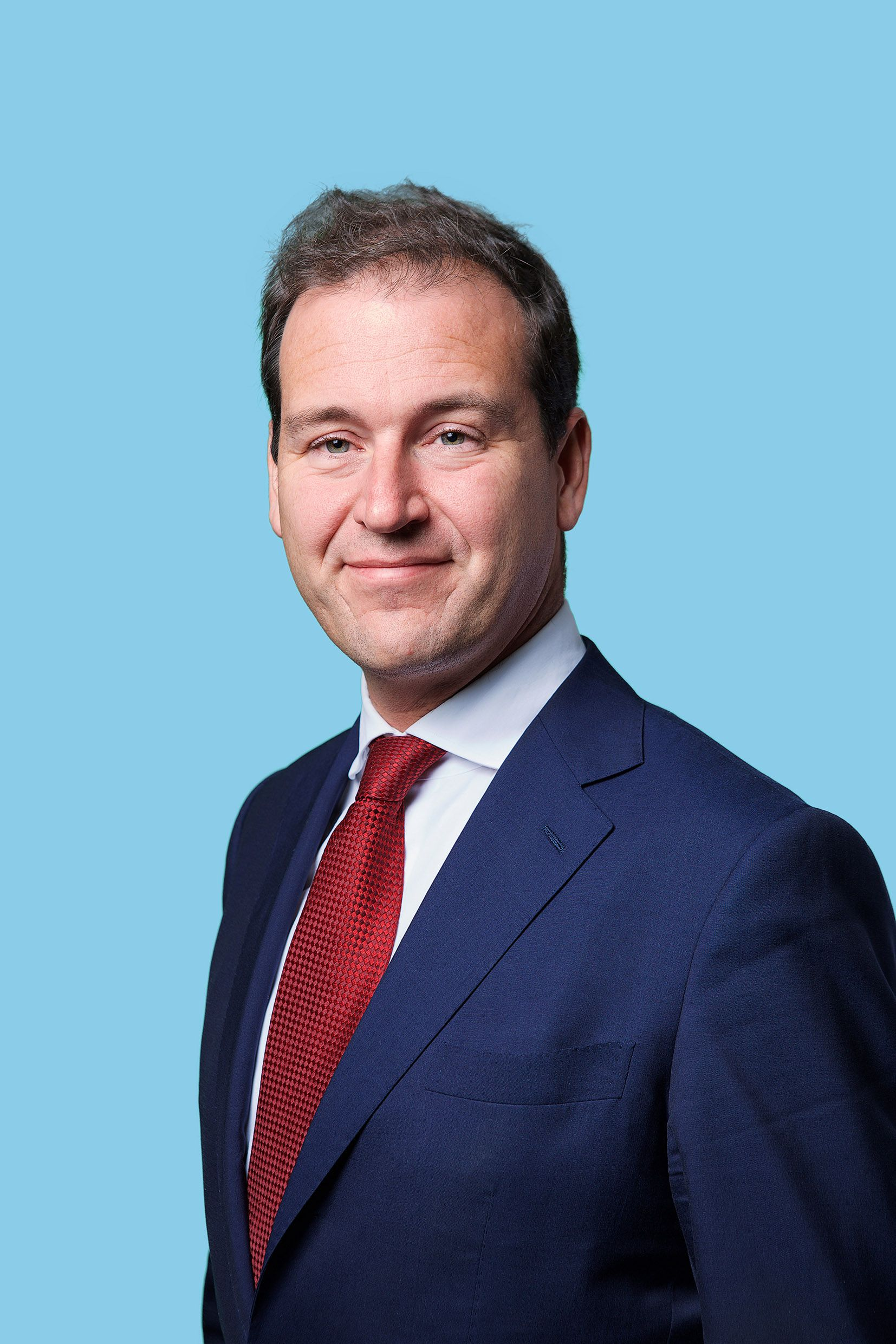 Lijsttrekker Tweede Kamerverkiezingen 2017. Foto: Lex Draijer.